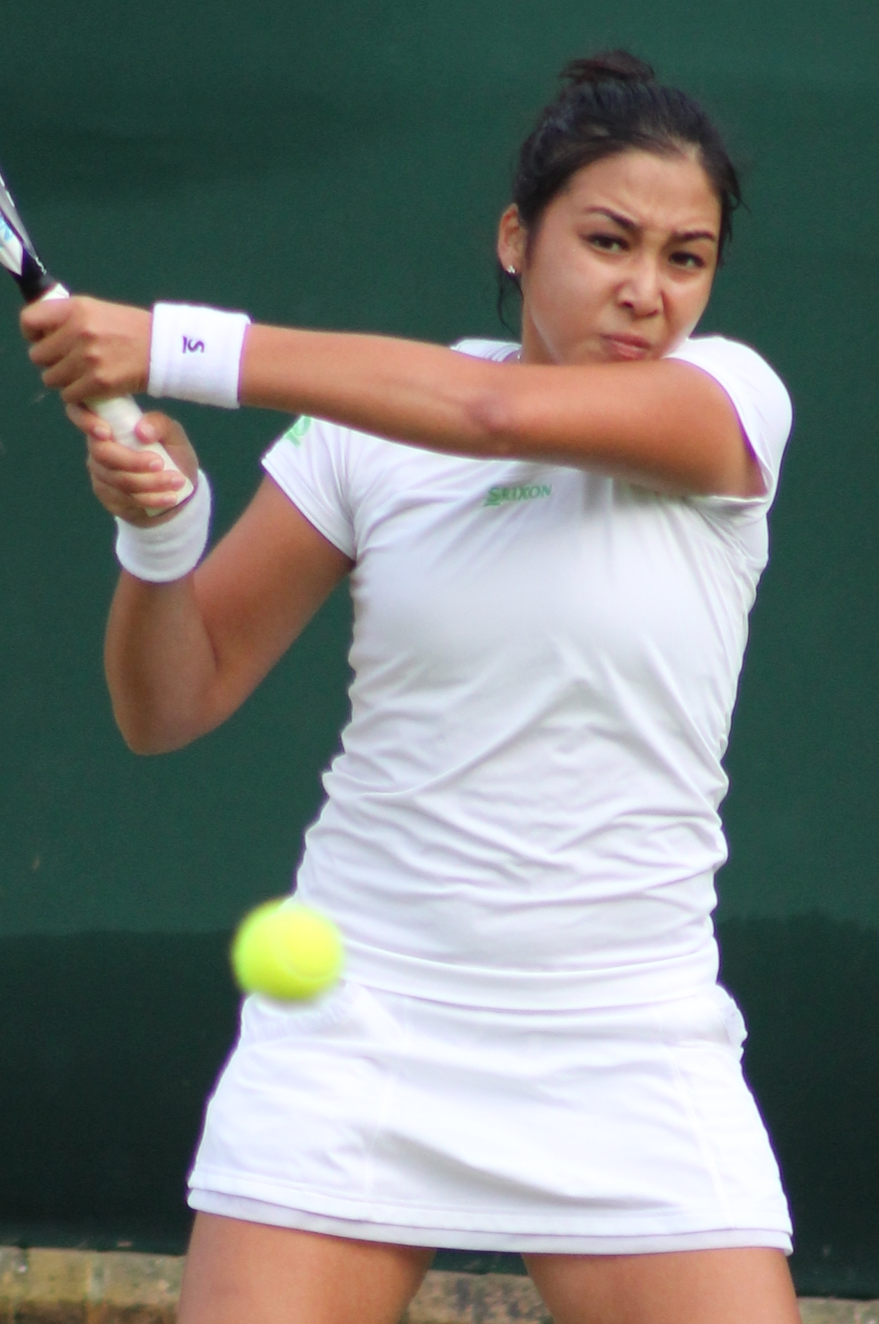 Diyas WM14 (9)